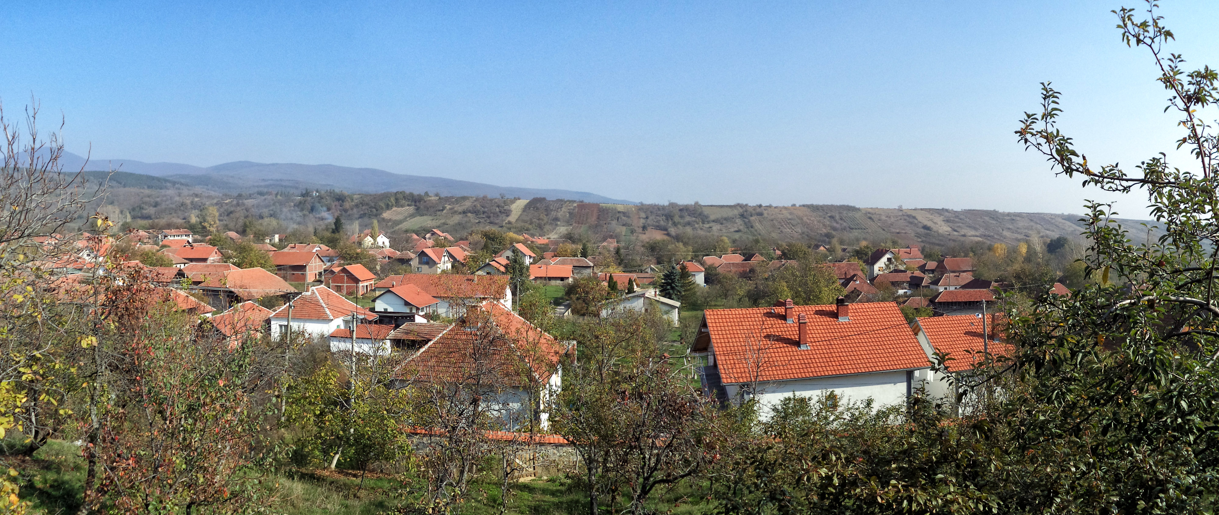 Село Доња Бресница Топлички округ Република Србија